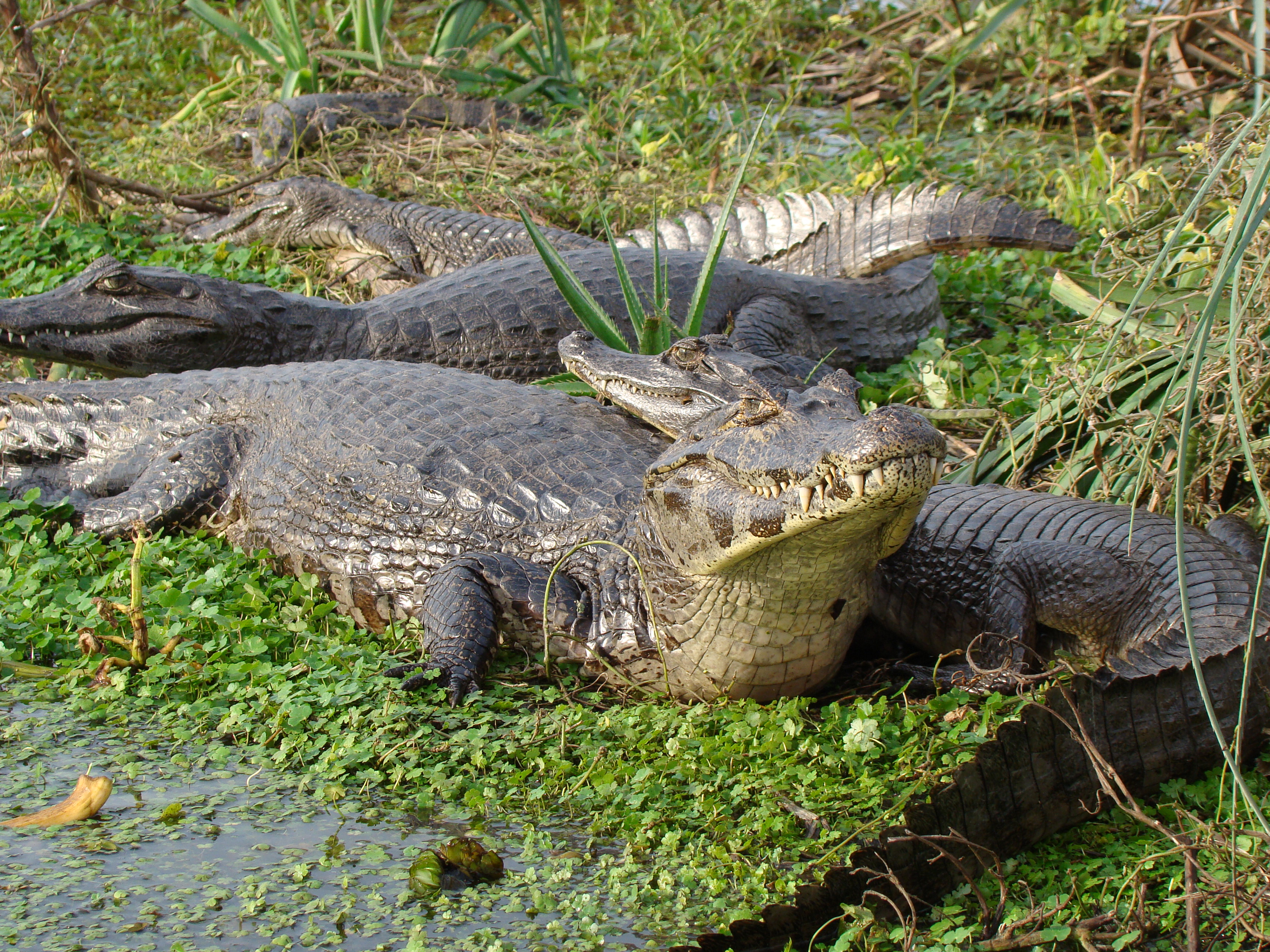 Ejemplares de Caiman_Yacare en los Esteros de Ibera Corrientes